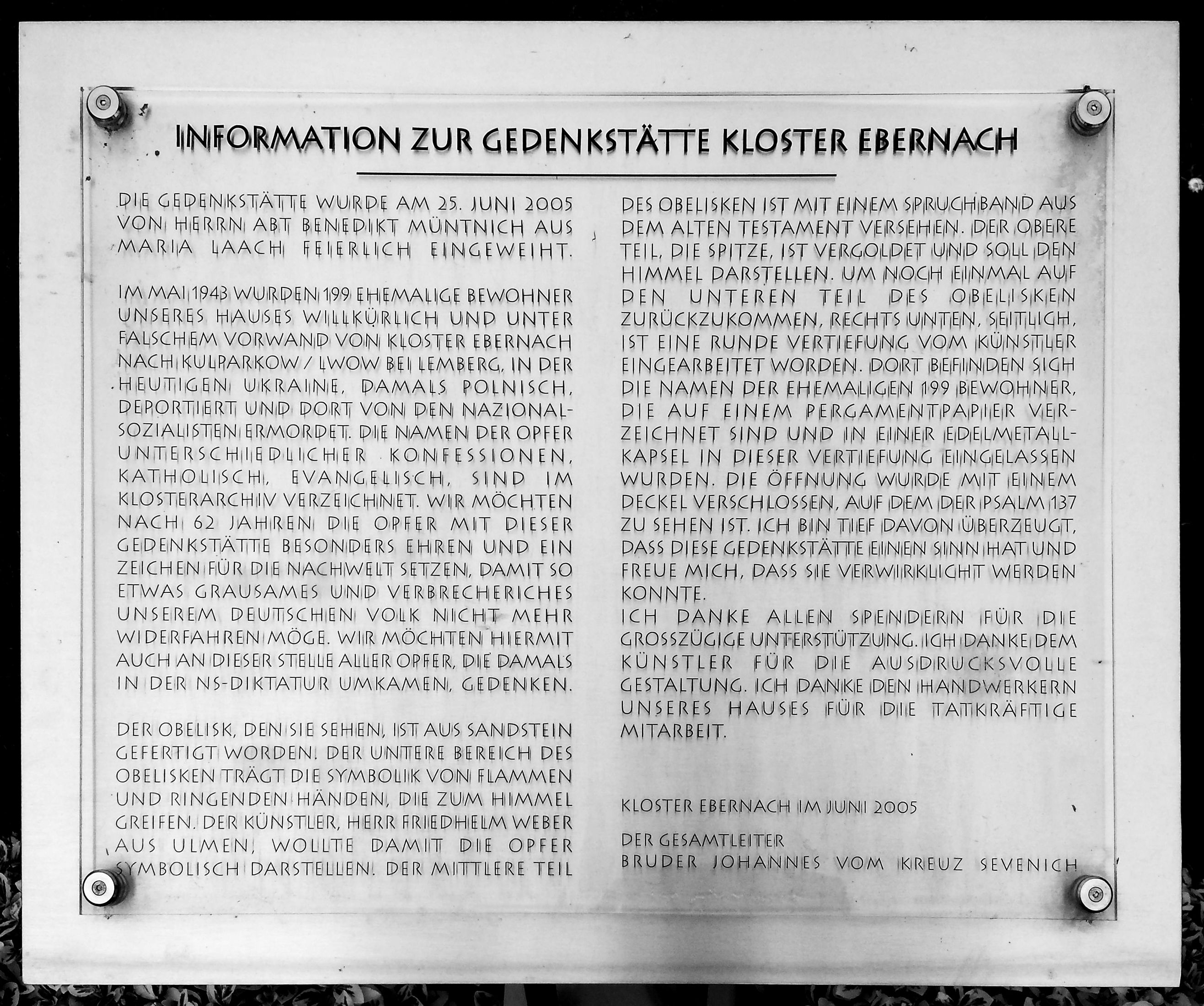 Informationpanel